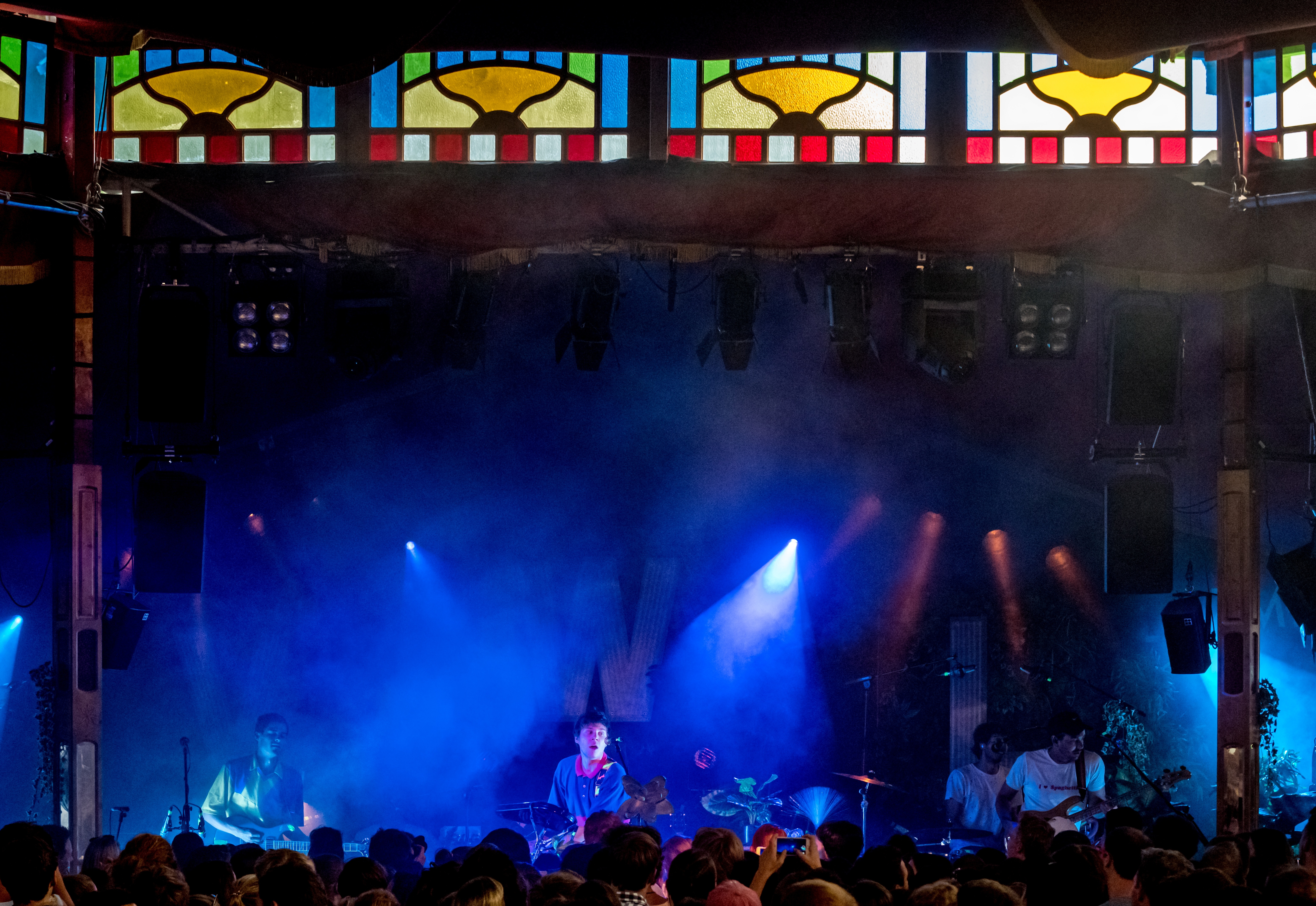 Bilder vom Zelt Musik Festival 2018 in Freiburg im Breisgau Von wegen Lisbeth am 28.07.2018 im Spiegelzelt